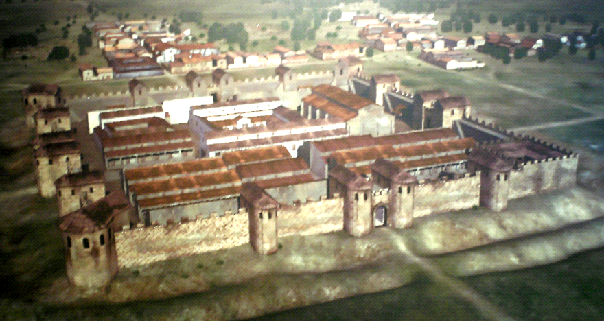 Rekonstruktionsversuch des Kastell und Vicus von Cannabiaca, Zeiselmauer/Österreich, Zustand im 4. Jahrhundert n.Chr.